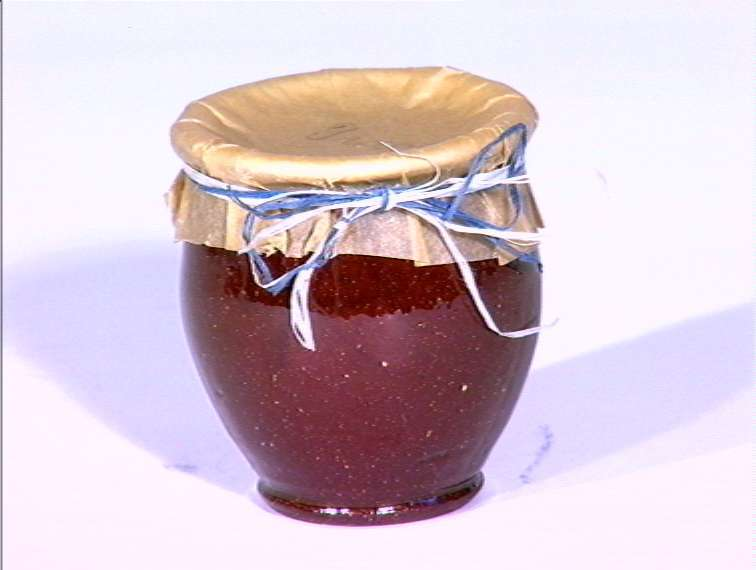 Leketøyskrukke fra 1890-årene viser hvordan man lukket syltekrukker med å binde fast et papir eller et klede over åpningen. Foto Anne Lise Reinsfelt / Norsk Folkemuseum, NF.1985-0175.